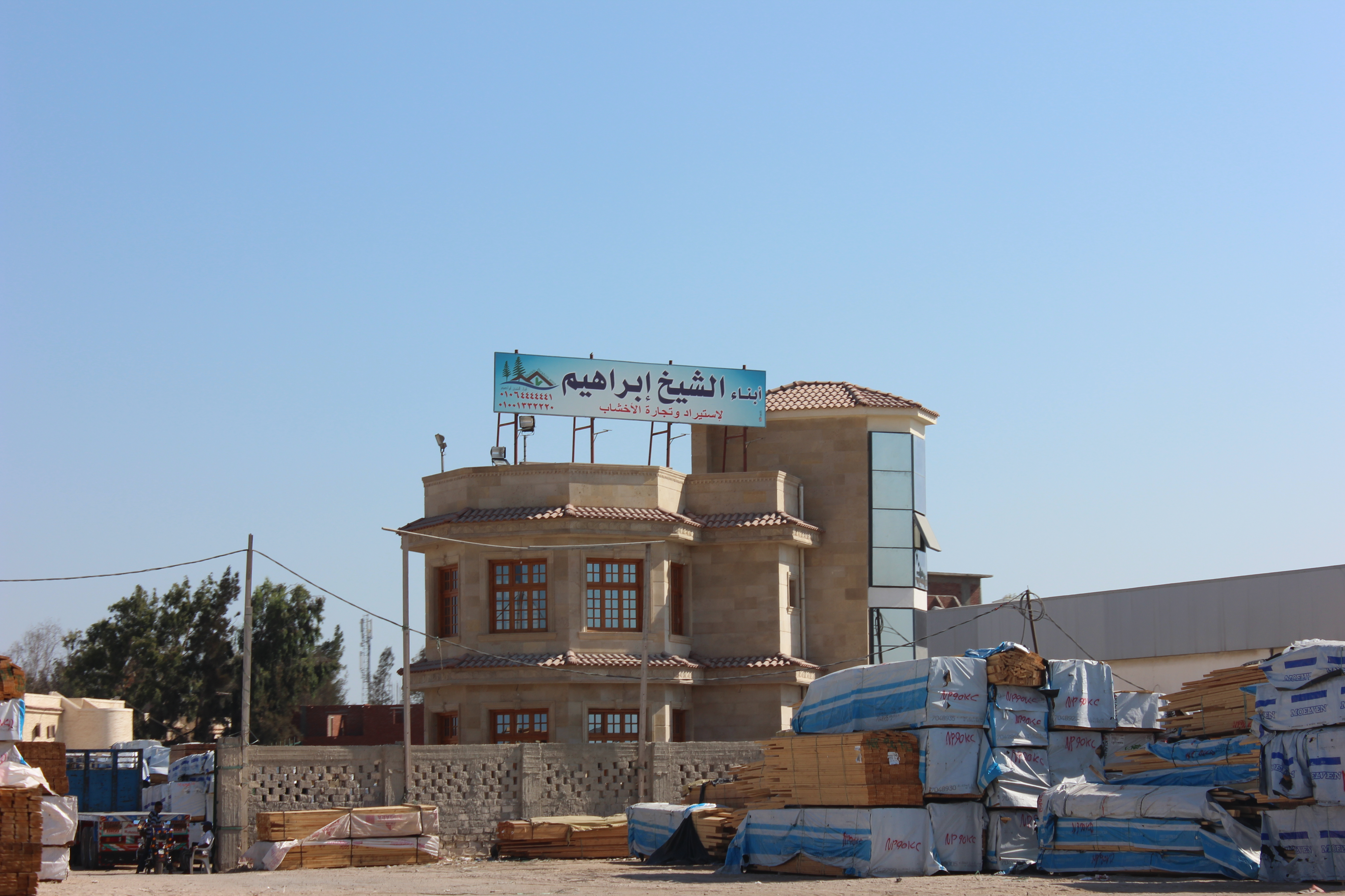 مباني الإسكندرية وبعض العلامات المميزة.